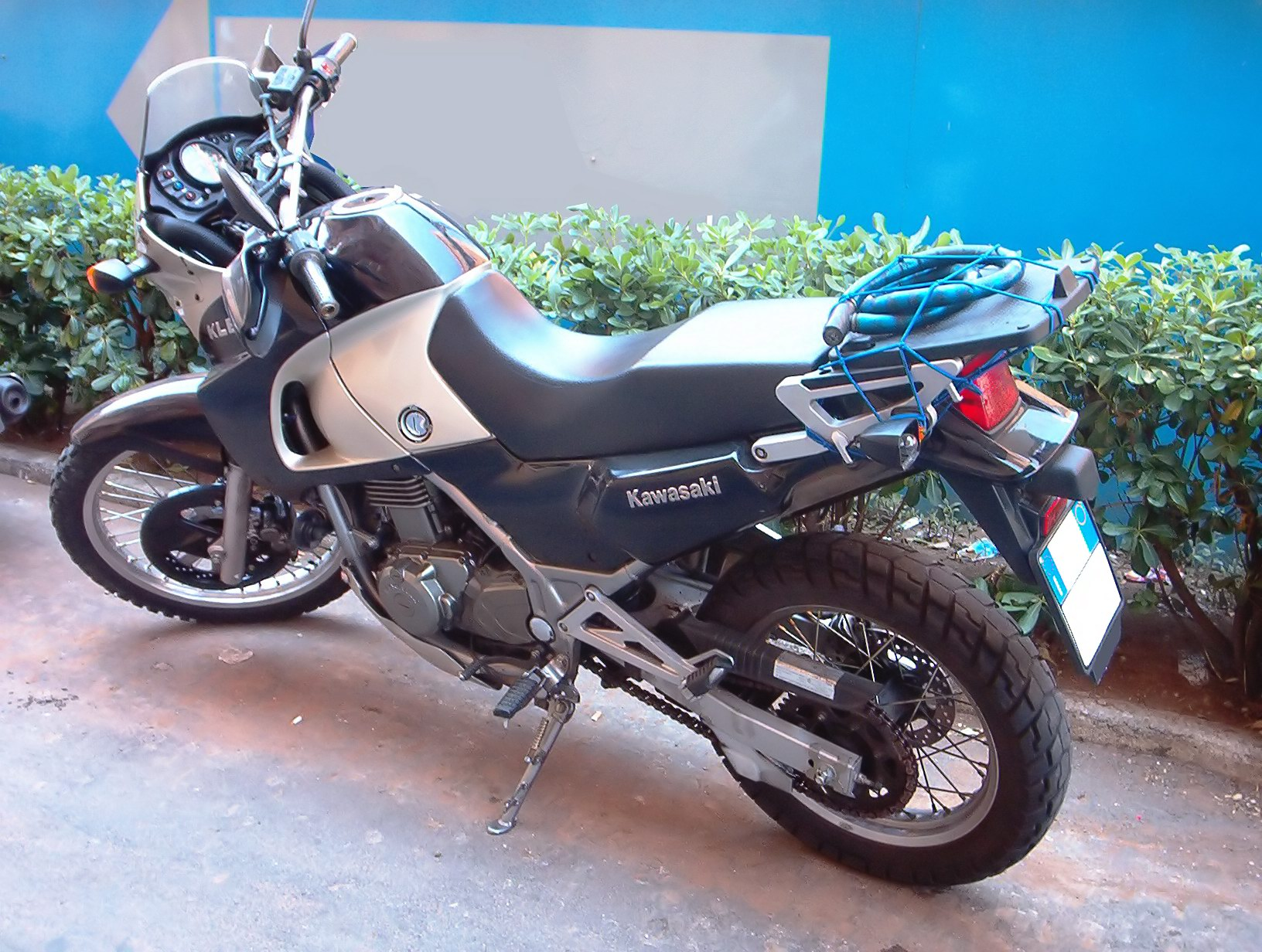 Black Kawasaki KLE 500, photo taken in 2003.